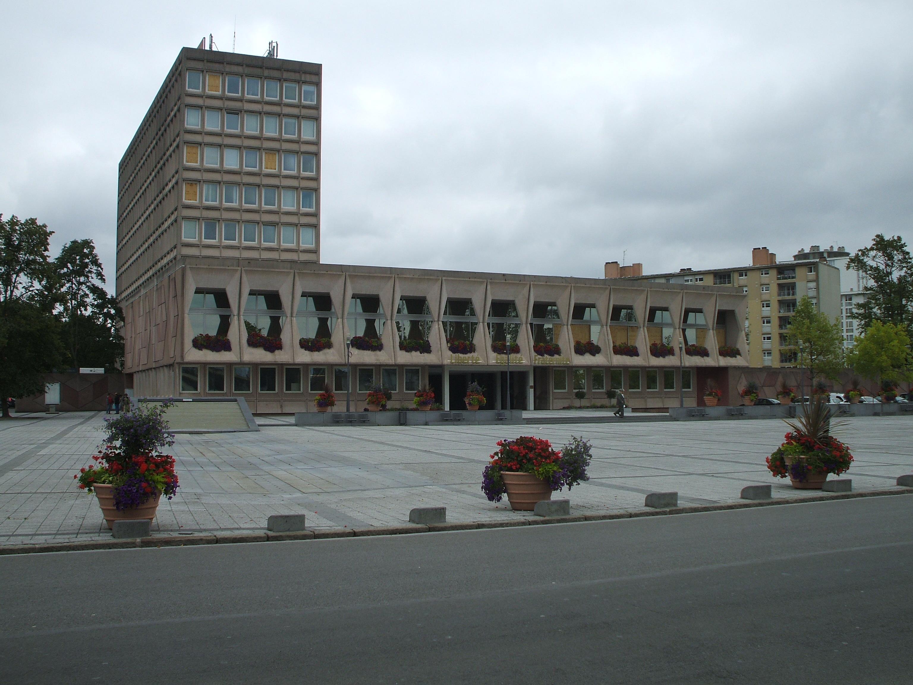 mairie de maubeuge